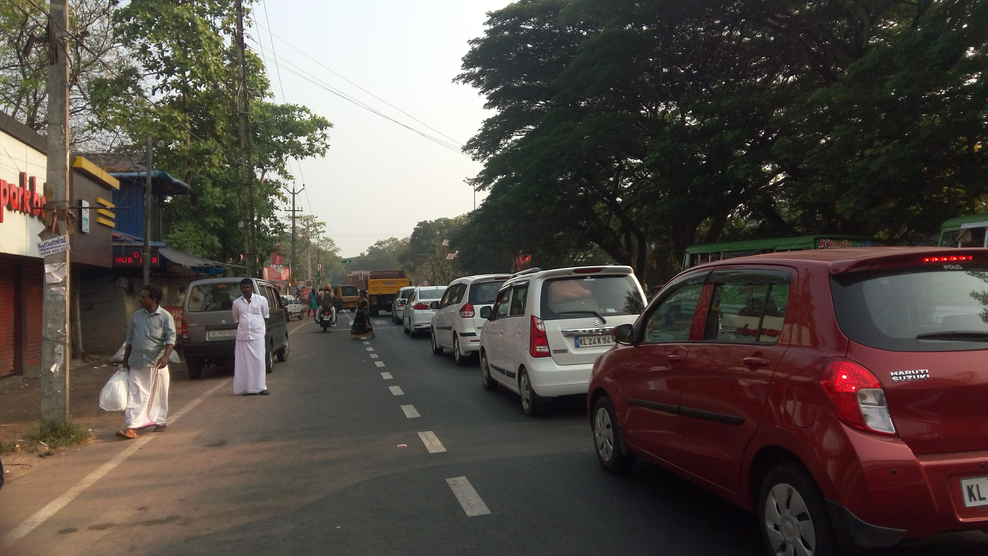 തിരക്കേറിയ കലവൂർ കവല